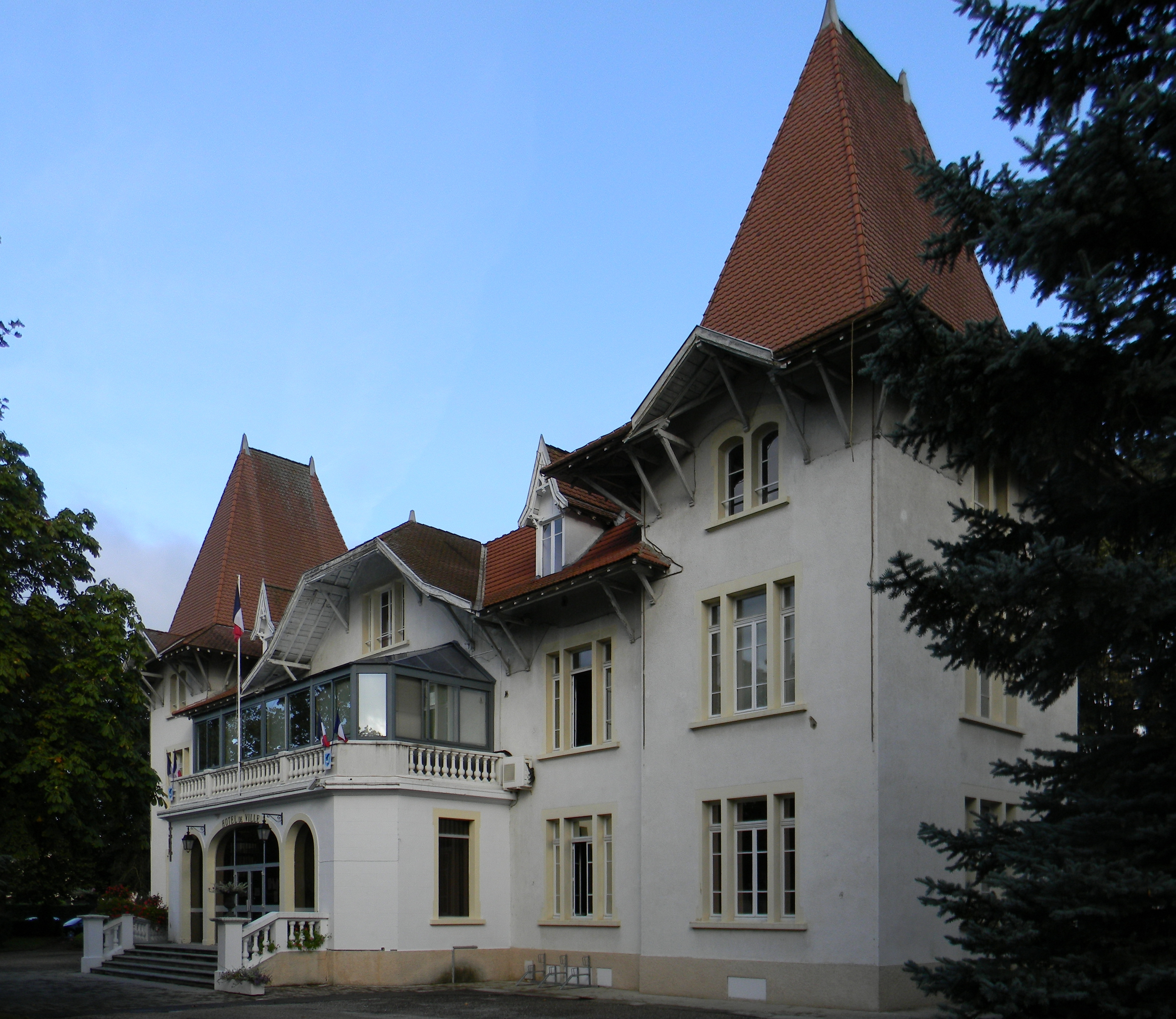 Mairie de Charvieu-Chavagneux.